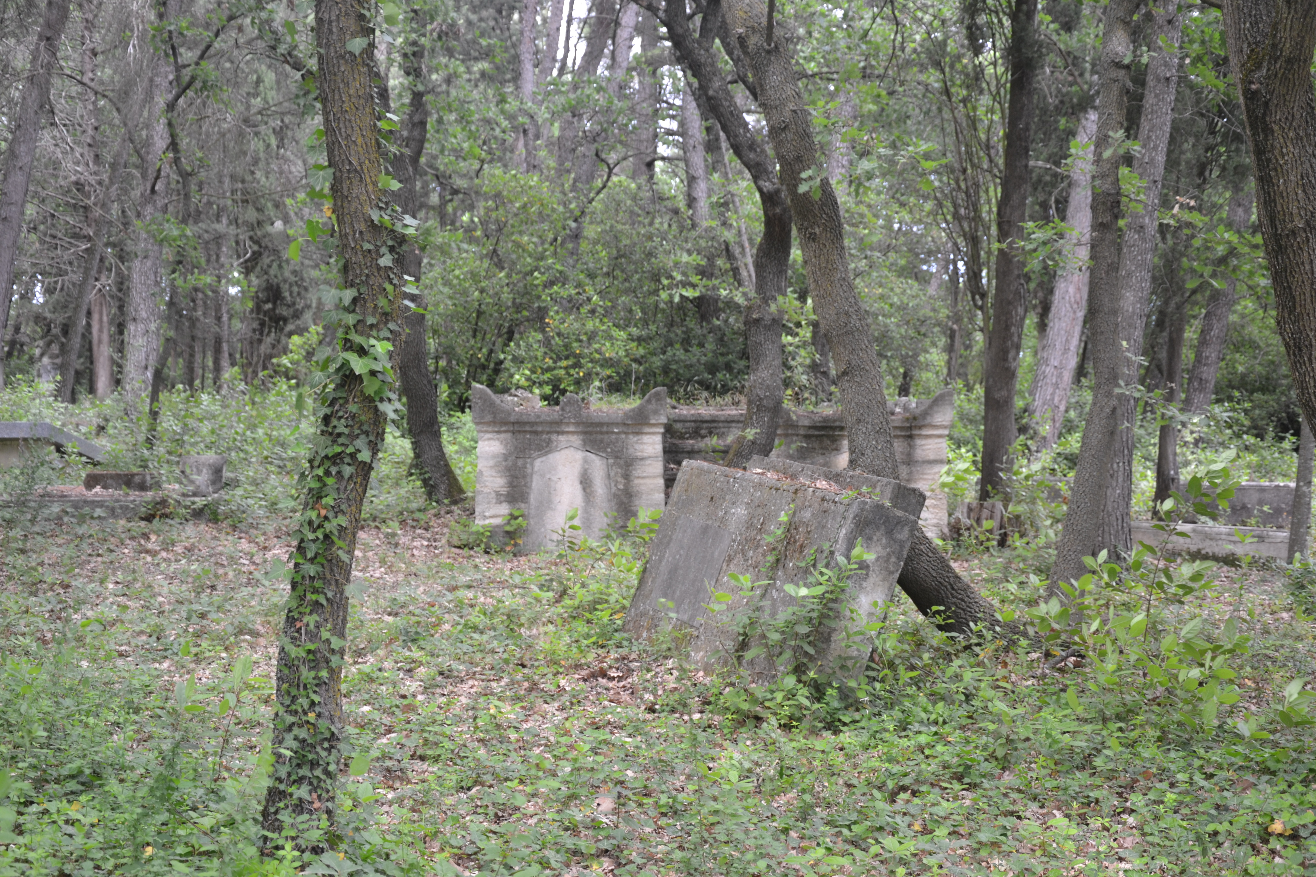 cimetière juif de Carpentras